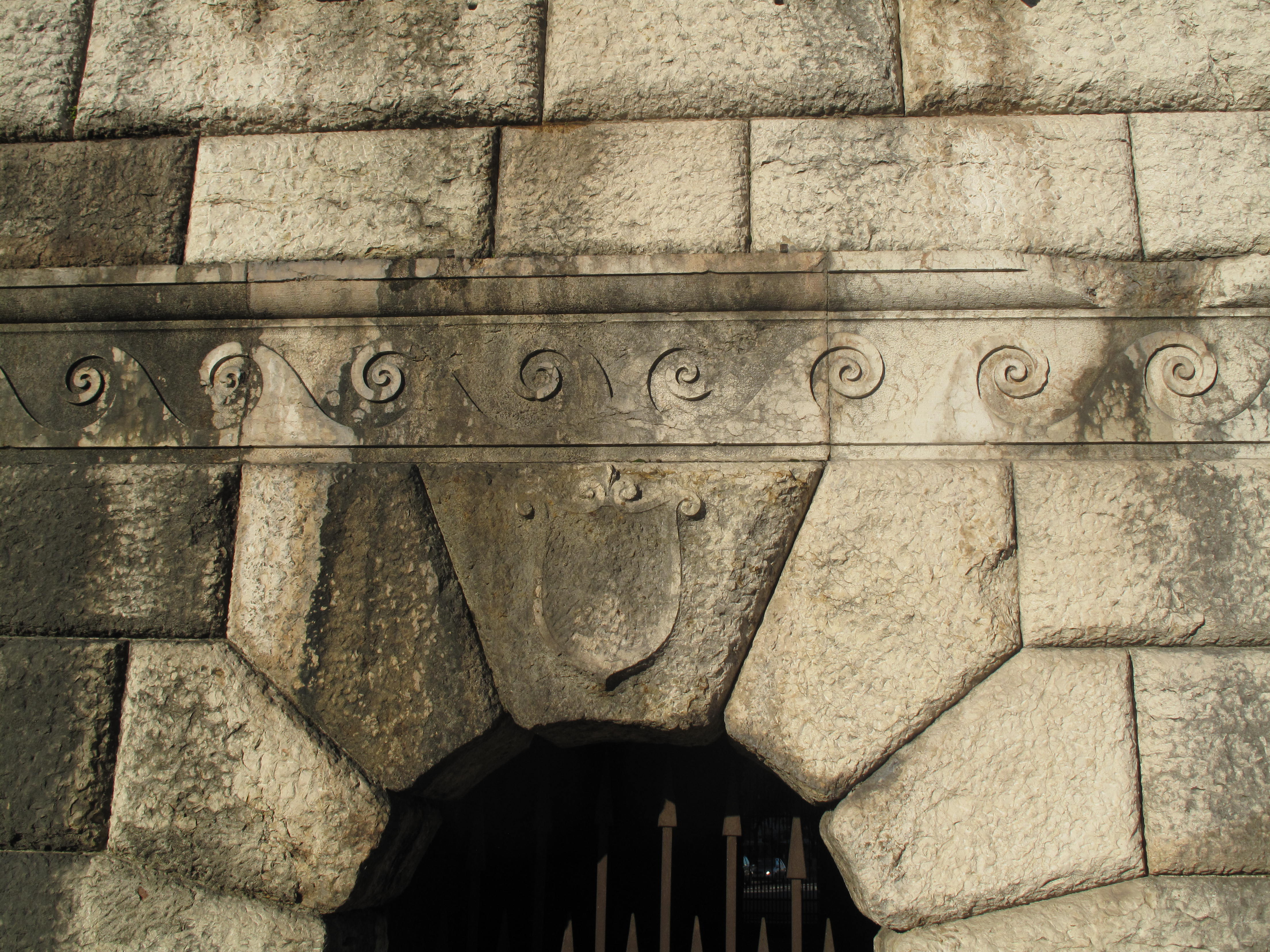 Dettaglio del motivo decorativo più volte ripreso dentro e fuori all'edificio, qui sulla facciata sud di Porta Nuova a Verona